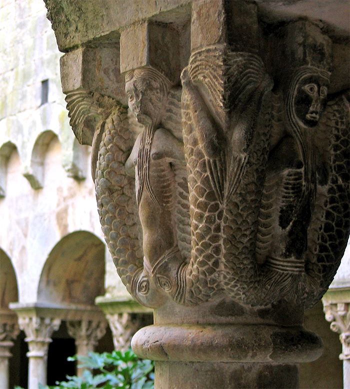 Sirenas de doble cola, monastero de Sant Pere de Galligants, Girona. Siglo XII d.C. Autor:Chosovi